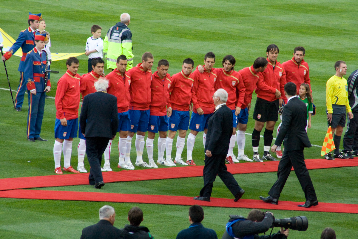 Serbian national football team (from left: Danko Lazović, Milan "Lola" Smiljanić, Boško Janković, Slobodan Rajković, Saša Ilić, Antonio Rukavina, Zdravko Kuzmanović, Stefan Babović, Branislav Ivanović, Vladimir Stojković, and Ivica Dragutinović) before the friendly match against Ireland at Croke Park in Dublin.